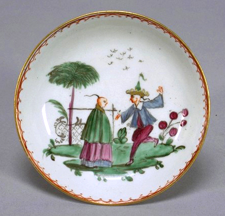 Piattino in porcellana con decoro a figure cinesi. Pasquale Antonibon, Nove, seconda metà del XVIII secolo.